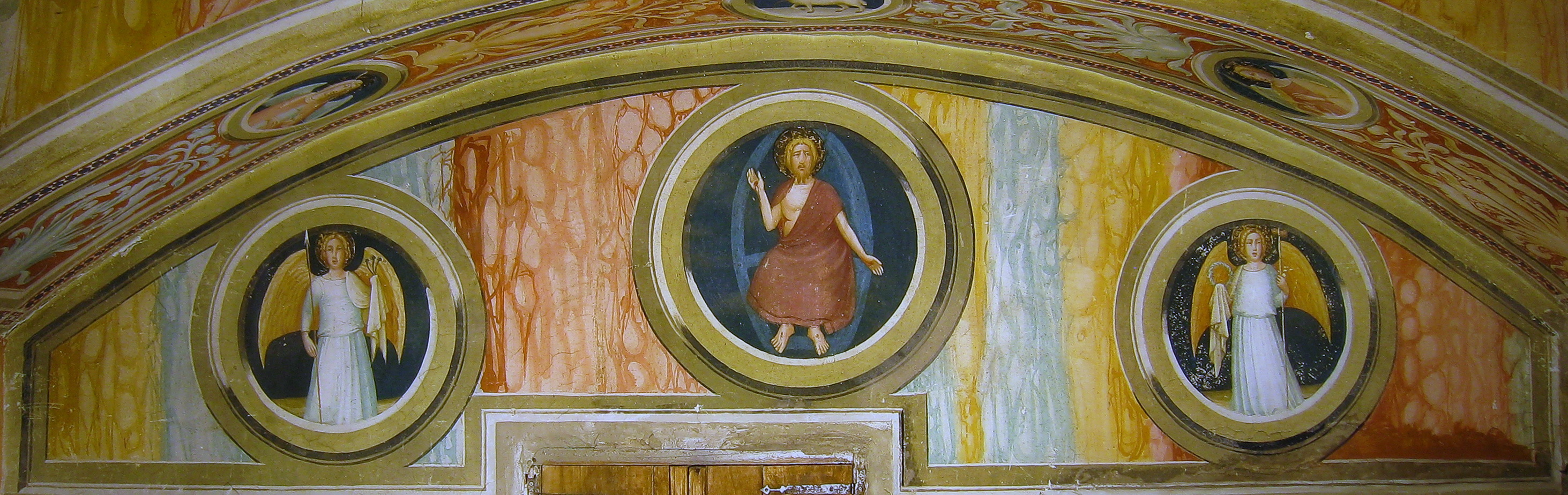 Conjunt d'imatges de la part superior de la paret on es troba la porta de la cel·la. Una Maiestà Domini al centre i dos àngels amb els símbols de la Passió a banda i banda